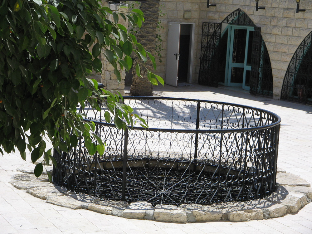 Колодец, вырытый Авраамом, г. Беэр-Шева